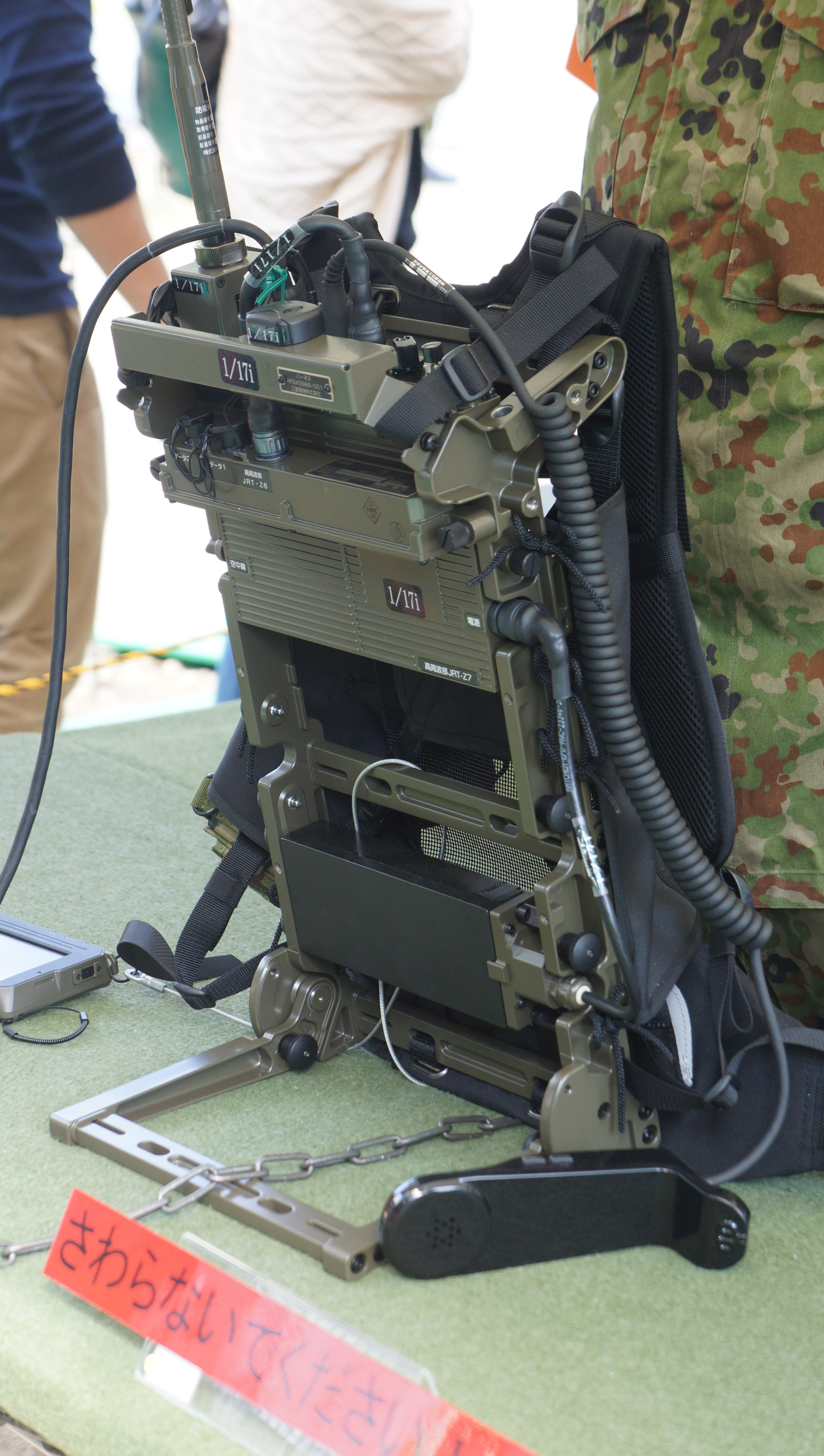 陸上自衛隊 広帯域多目的無線機（携帯用）。 13年10月13日 伊丹駐屯地にて。